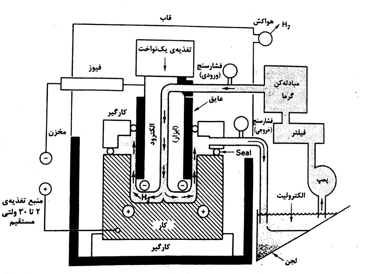 1 MATERIALS and PROCESSES in MANUFACTURING 9th edition ,Ernest Paul Degarmoتصویر از منبع ذکر شده برداشته و ترجمه شده است. .